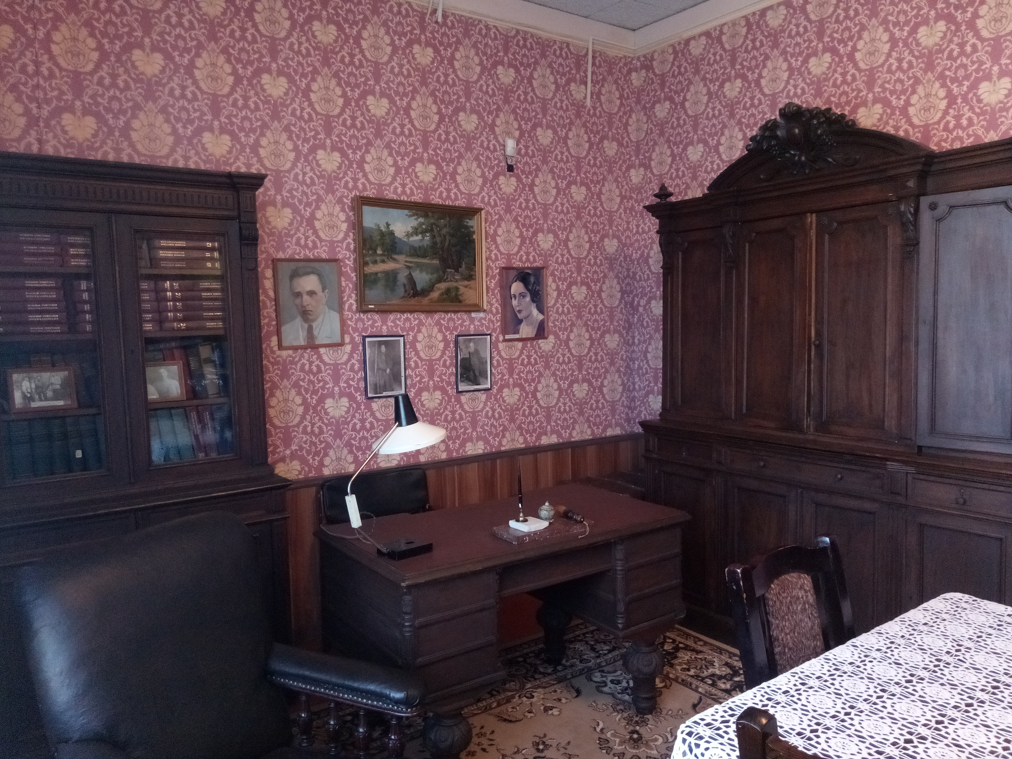 Экспазіцыя музея.